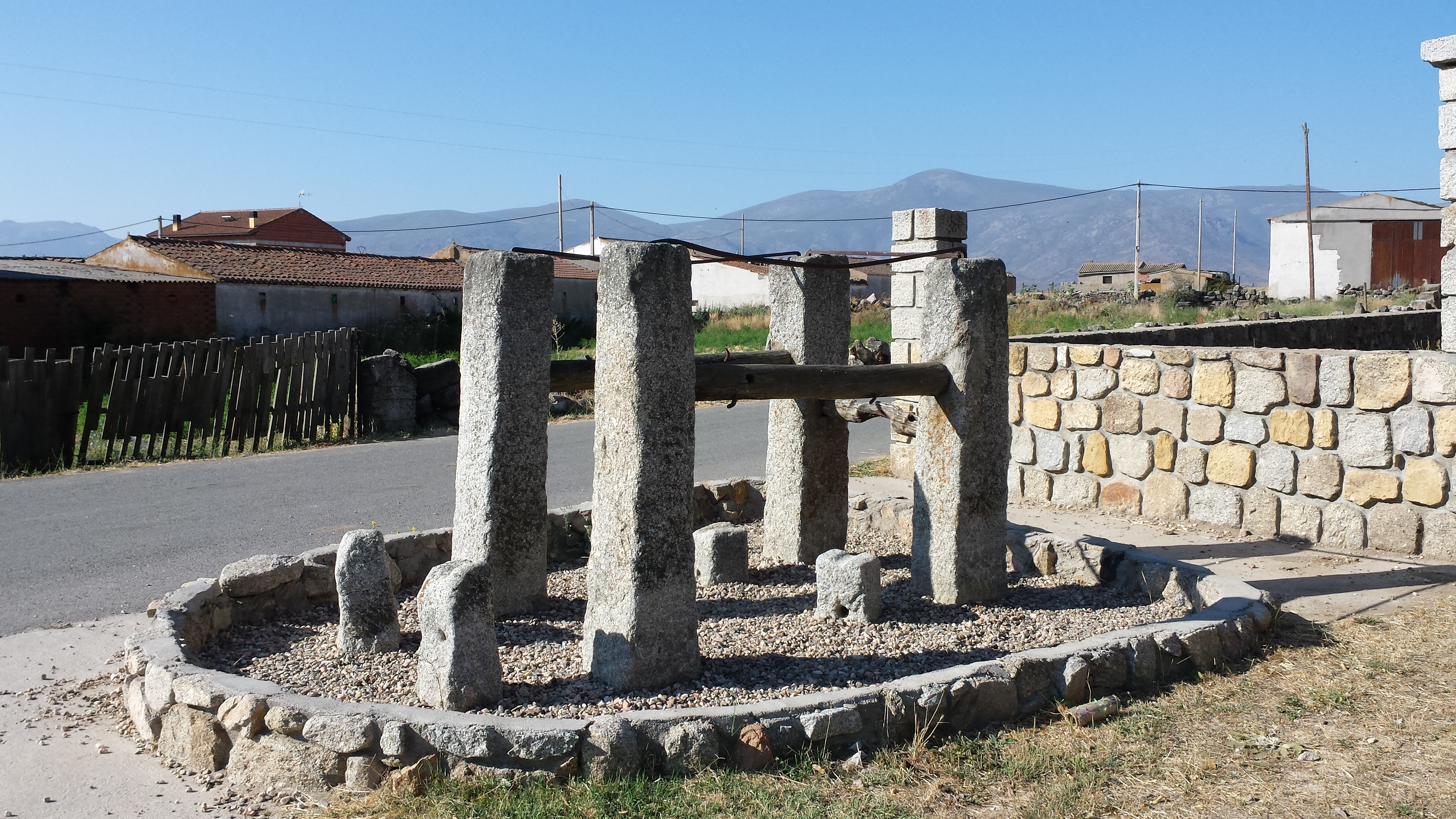 Potro de herrar, Muñana, Ávila, España.